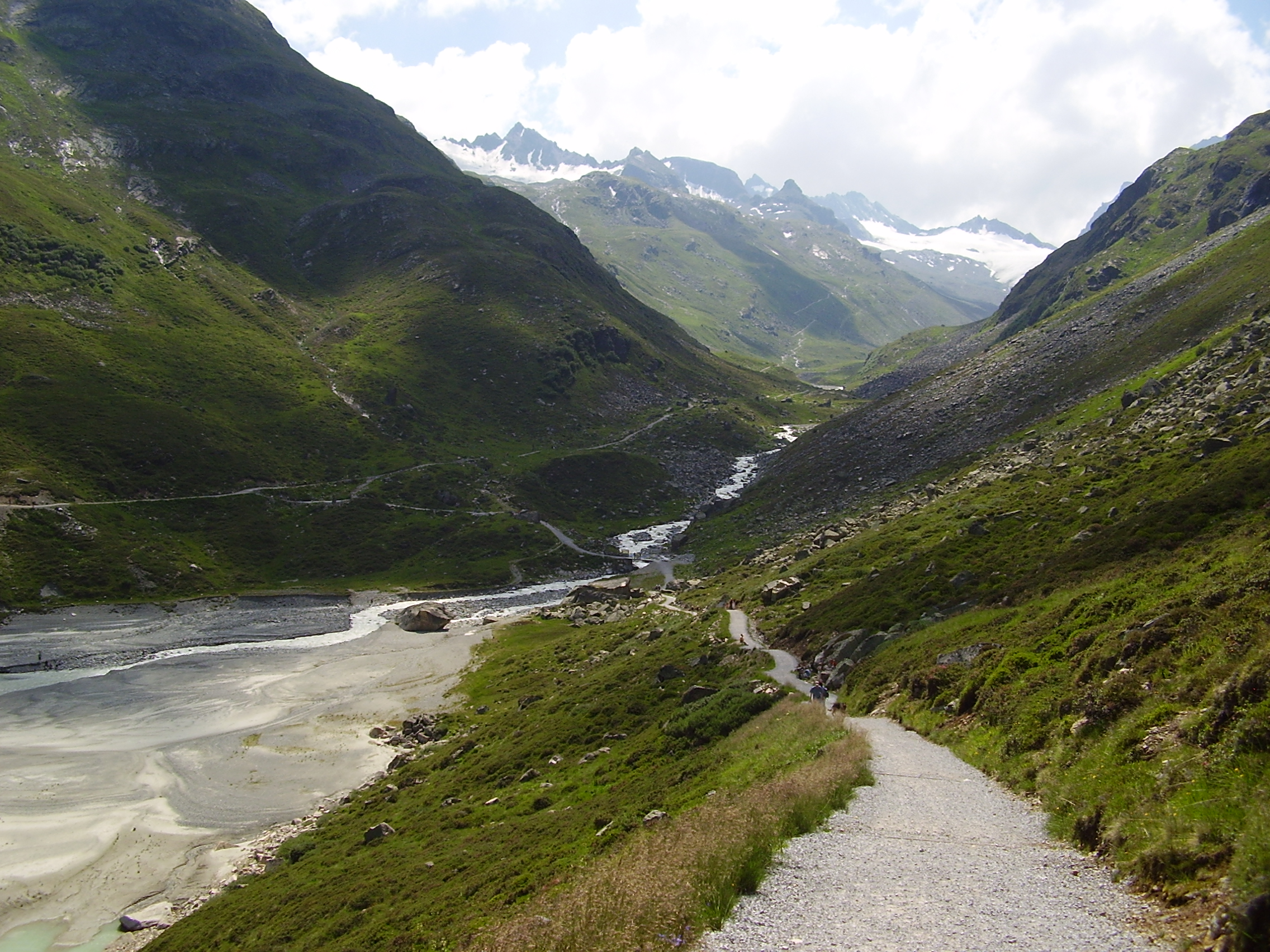 Wanderweg und Zufluss am Silvretta-Stausee.